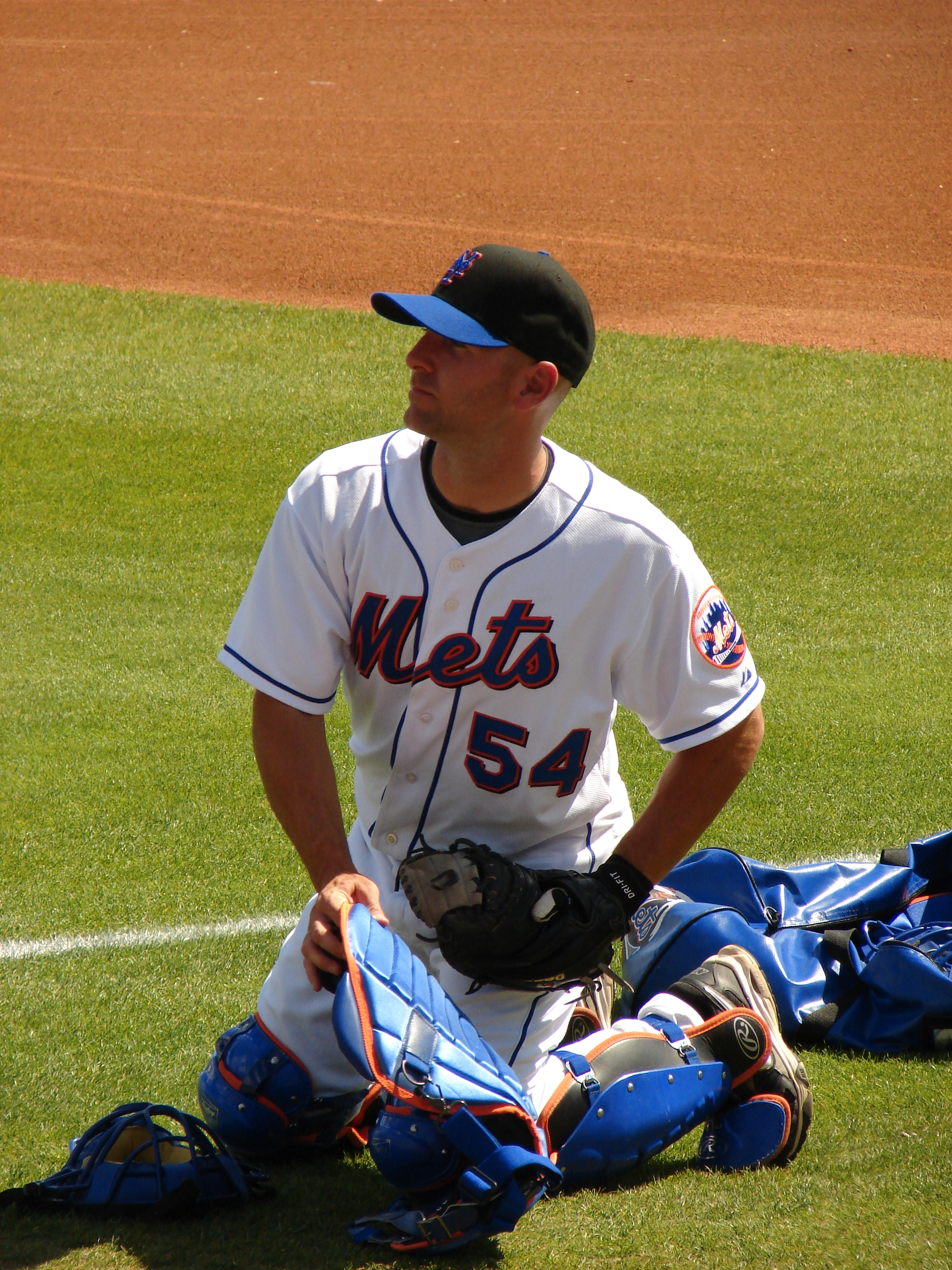 Dave Racaniello